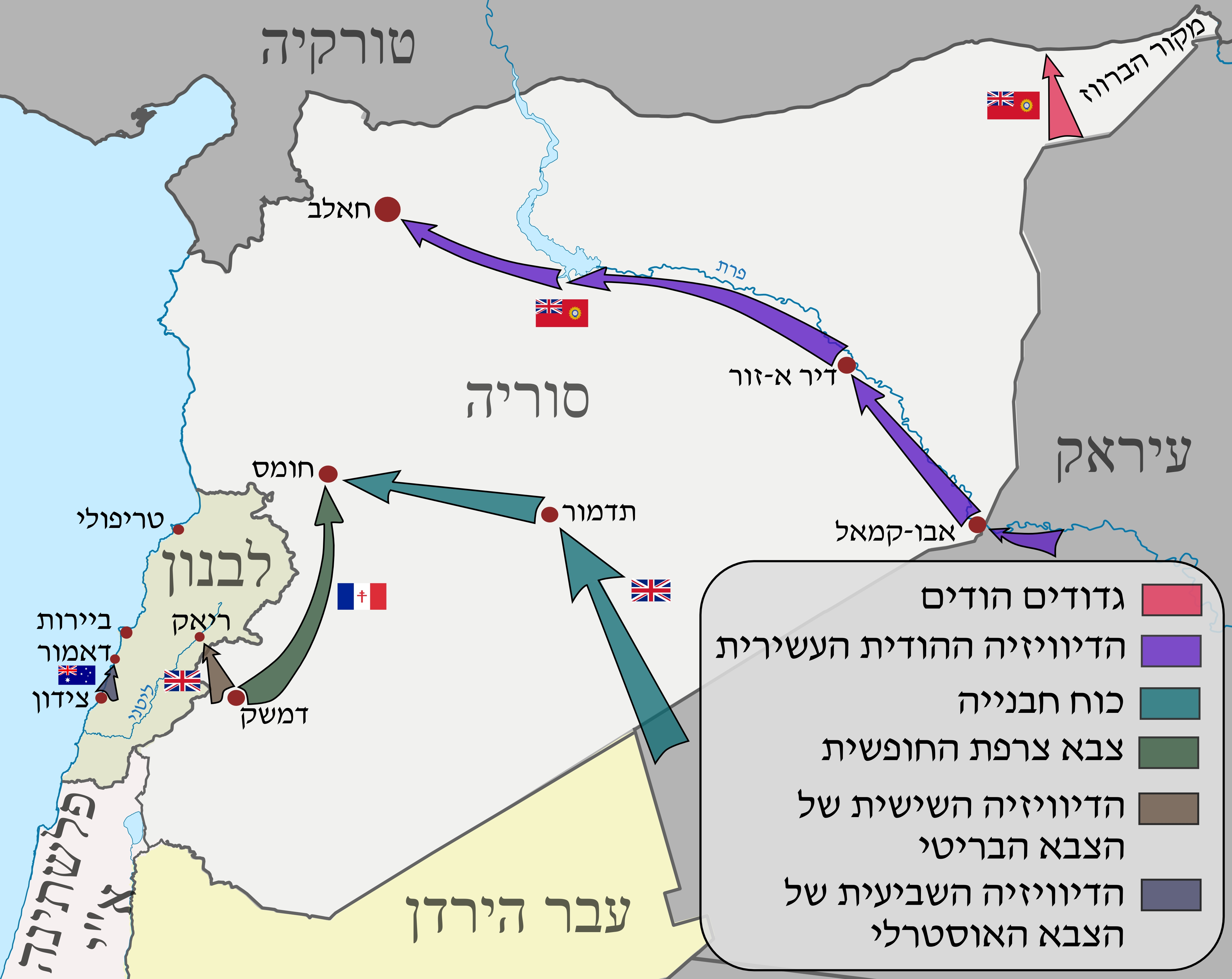 המערכה בסוריה ובלבנון בתקופת מלחמת העולם השנייה